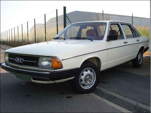 Audi100_c2 vo_li